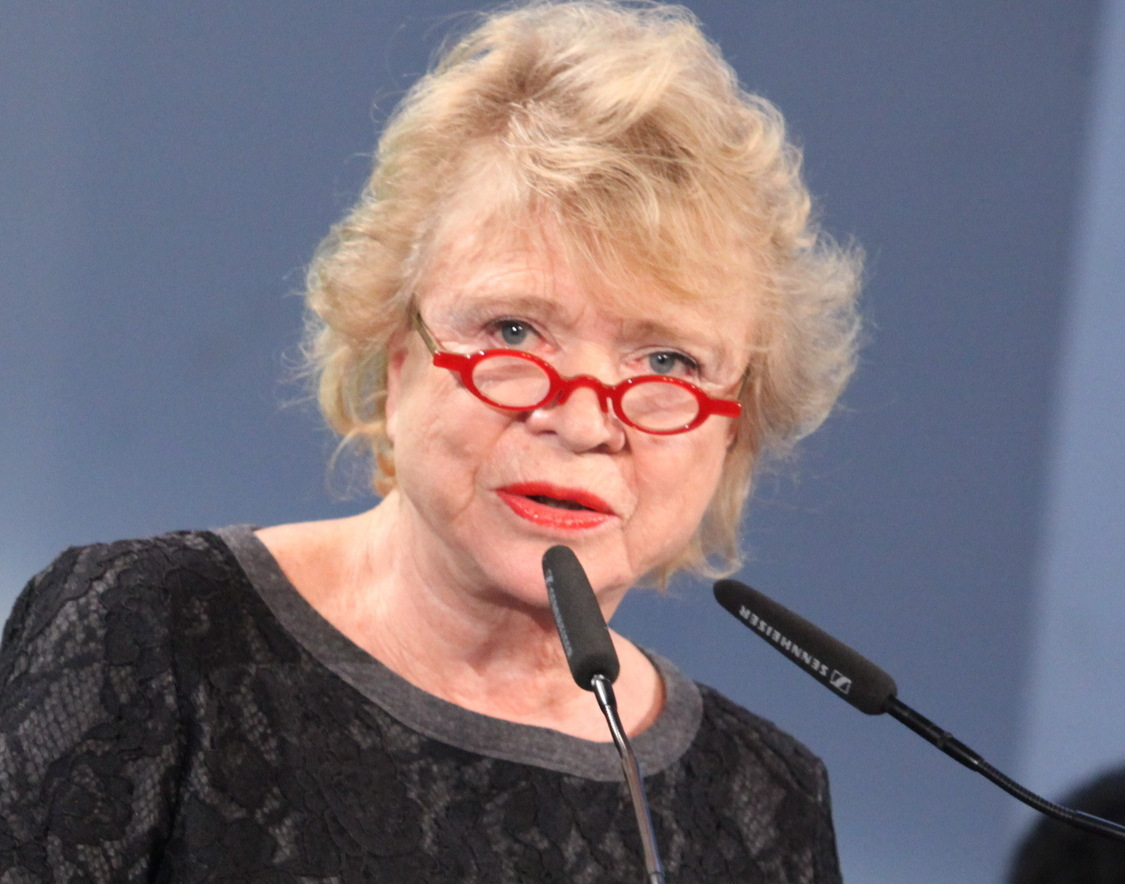 Crédit : Xavier Cantat